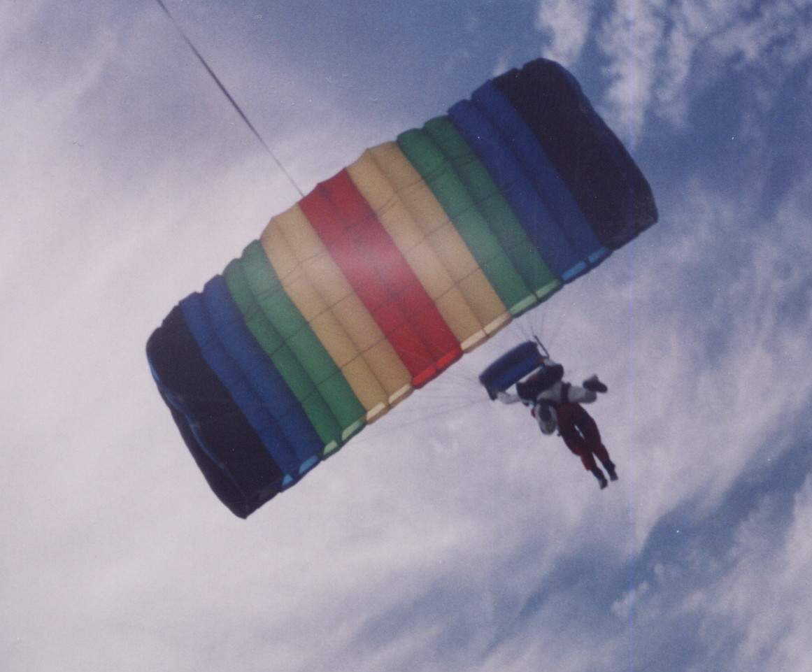 Paracaídas tándem descendiendo en el aeródromo de Tequesquitengo, Morelos, México